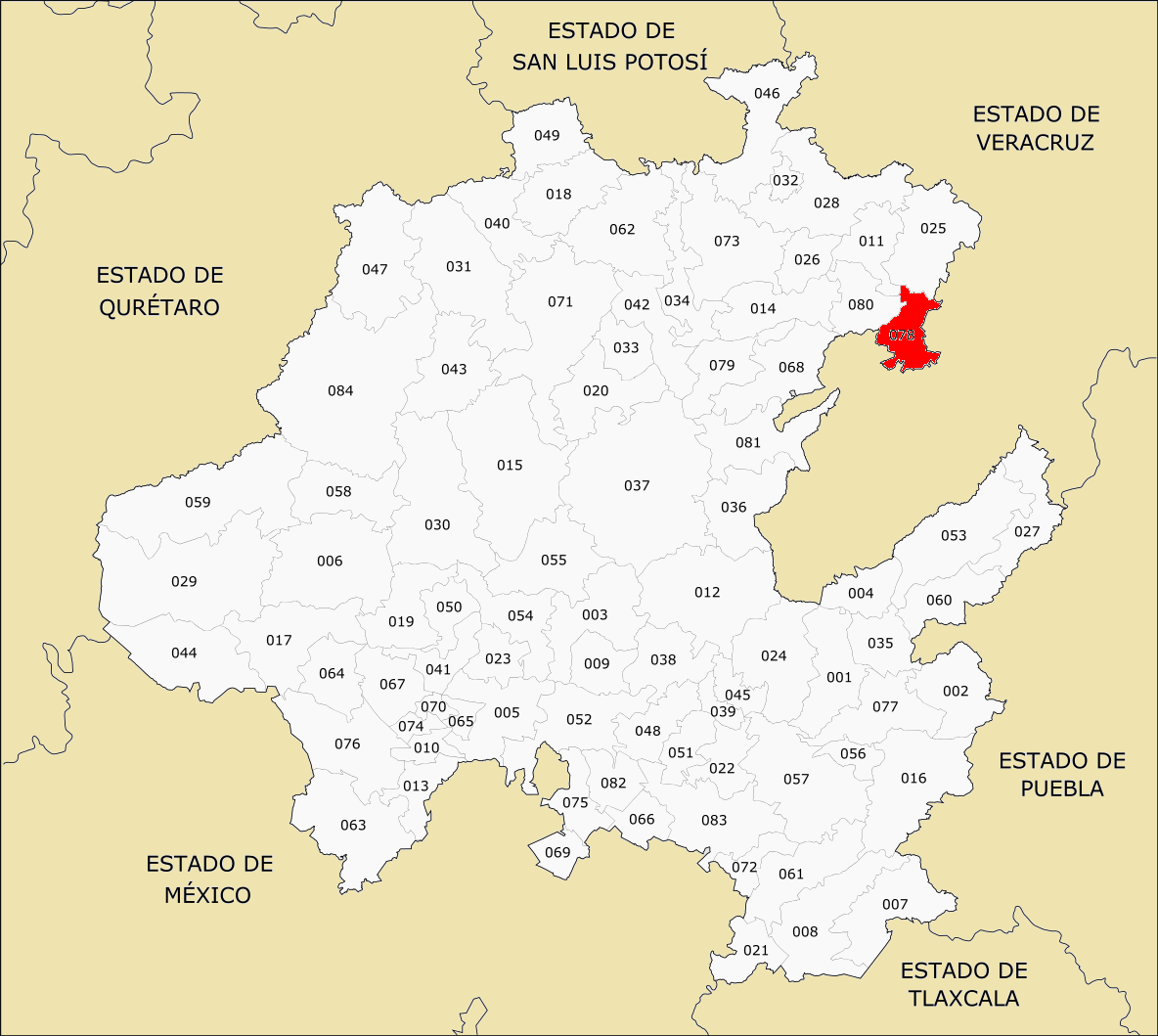 Municipios de Hidalgo